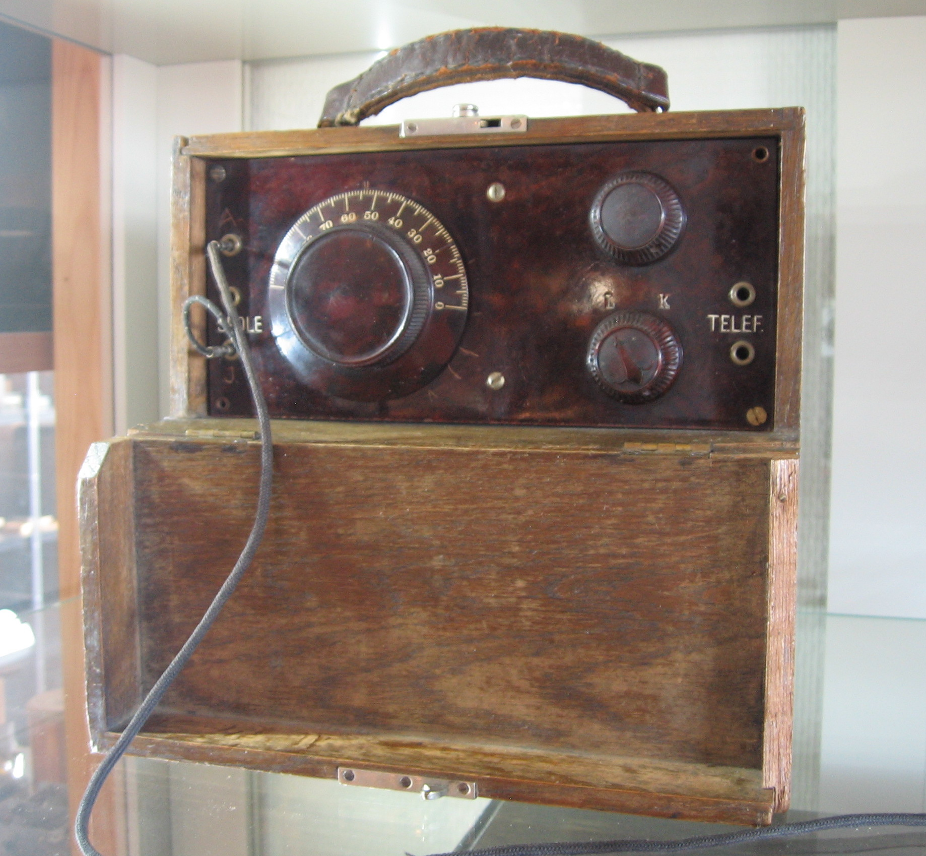 Den første radio fra Tandberg.